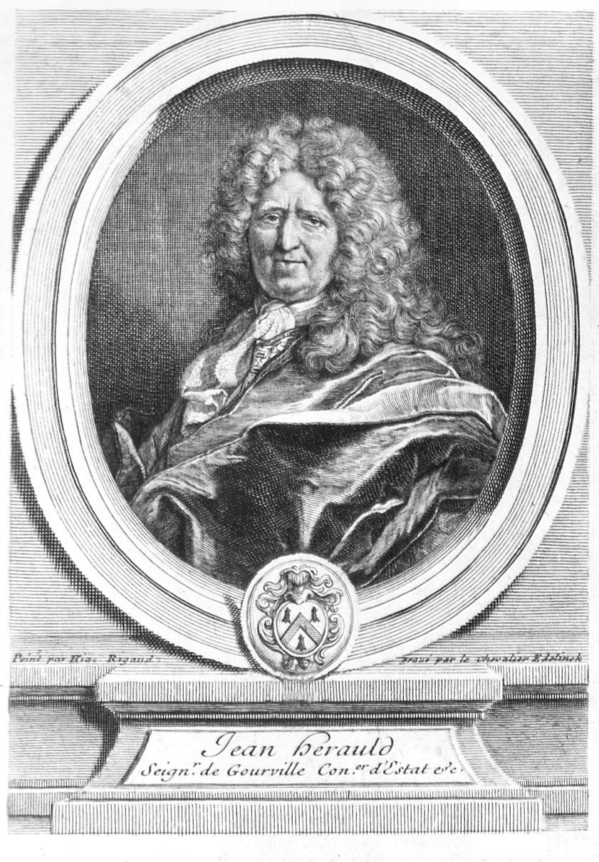 Portrait of Jean Hérault de Gourville (1625-1703)